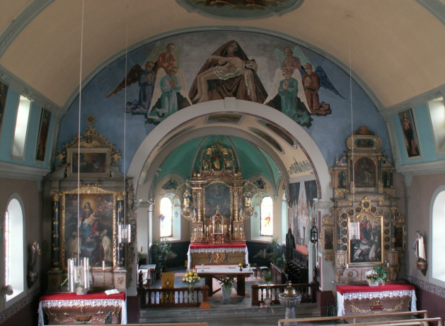 Das Innere der im 17. Jahrhundert gebauten[1] Kirche von La Roche FR